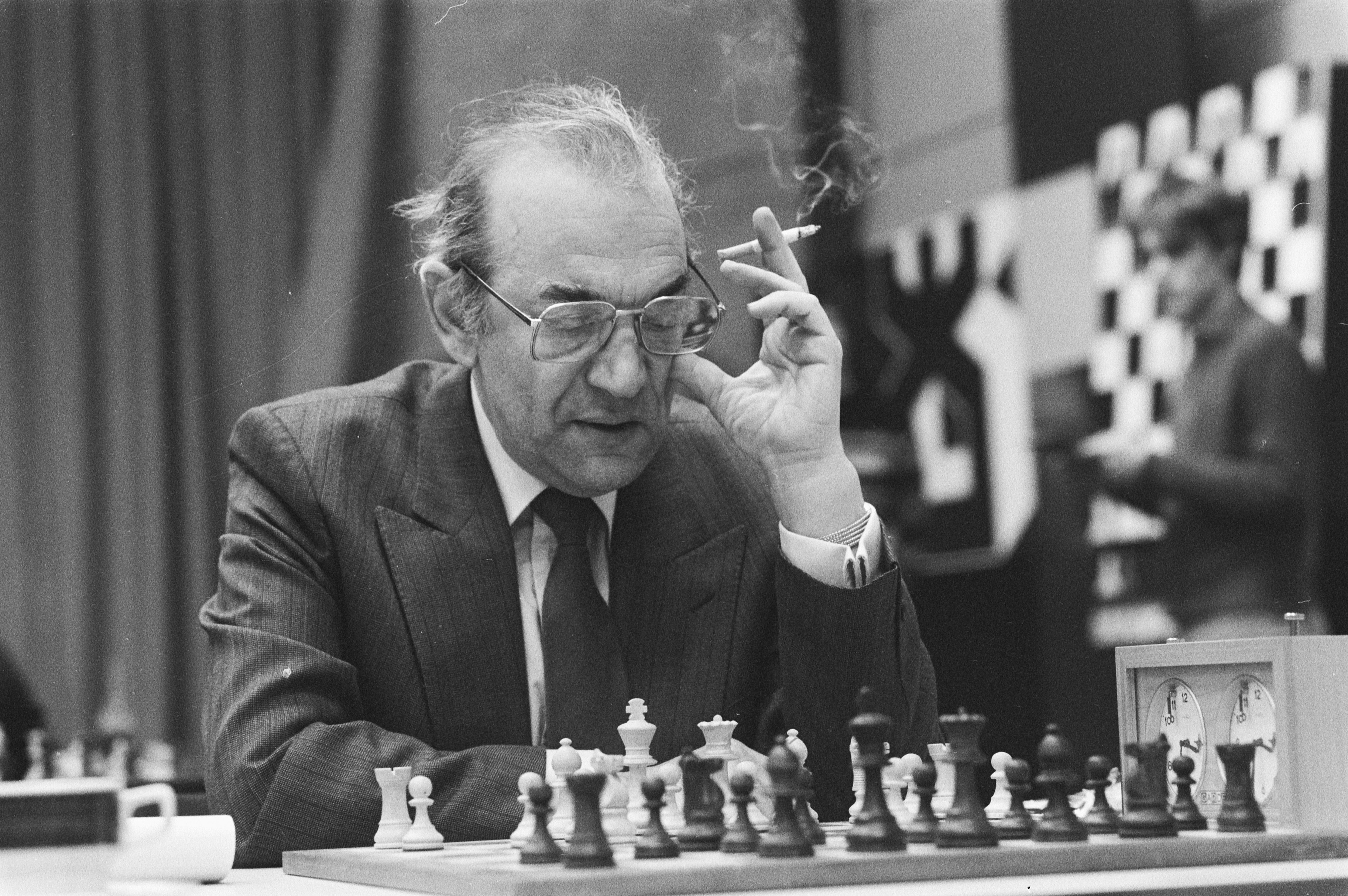 Collectie / Archief : Fotocollectie Anefo Reportage / Serie : [ onbekend ] Beschrijving : Hoogovenschaaktoernooi, 9e ronde; Kortsjnoj (close), 15 Georgiev (close) Datum : 29 januari 1985 Trefwoorden : schaken Persoonsnaam : Georgiev, Kortsjnoi, Viktor Instellingsnaam : Hoogovenschaaktournooi Fotograaf : Croes, Rob C. / Anefo Auteursrechthebbende : Nationaal Archief Materiaalsoort : Negatief (zwart/wit) Nummer archiefinventaris : bekijk toegang 2.24.01.05 Bestanddeelnummer : 933-2188